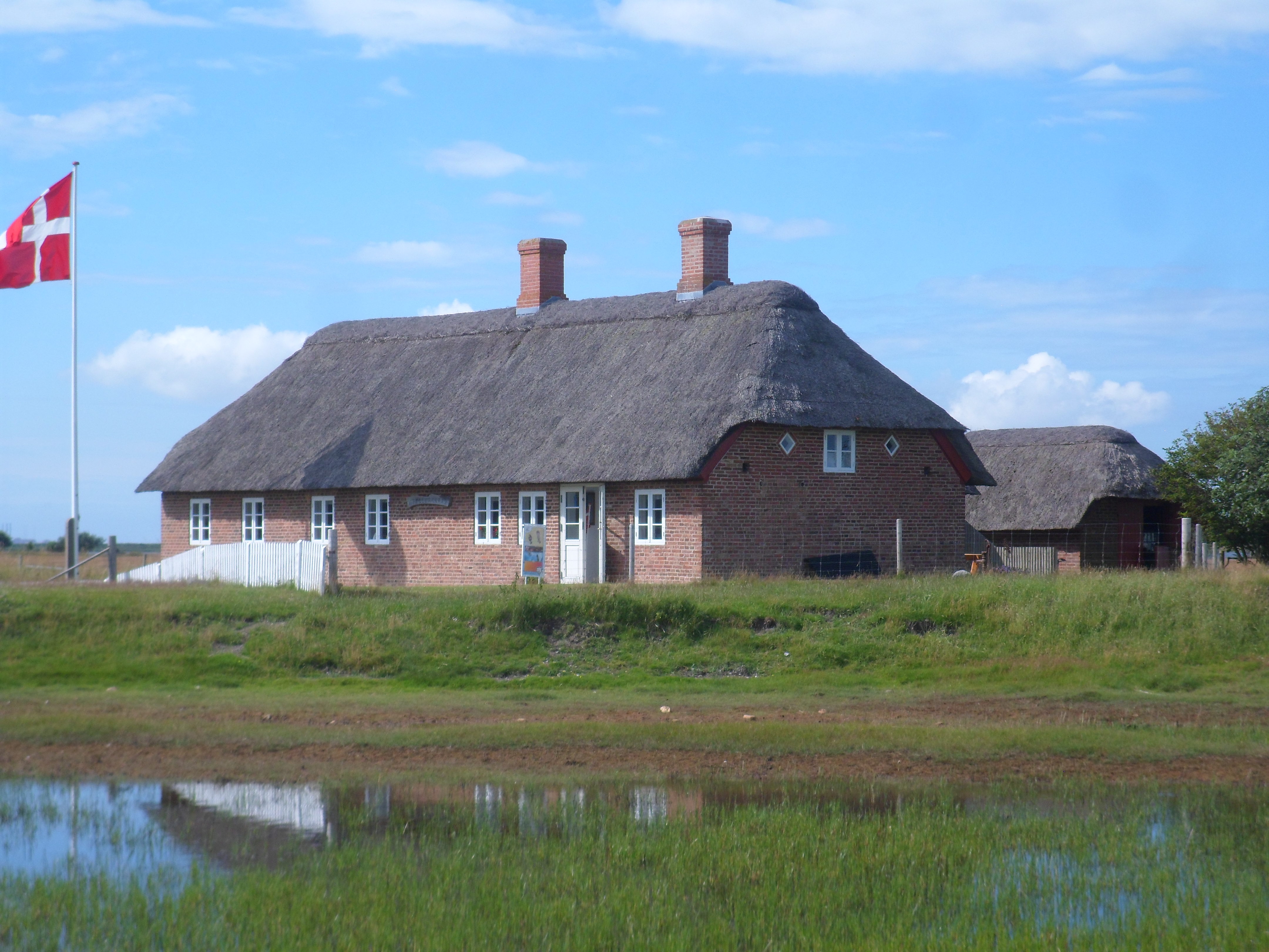 Gjellergård